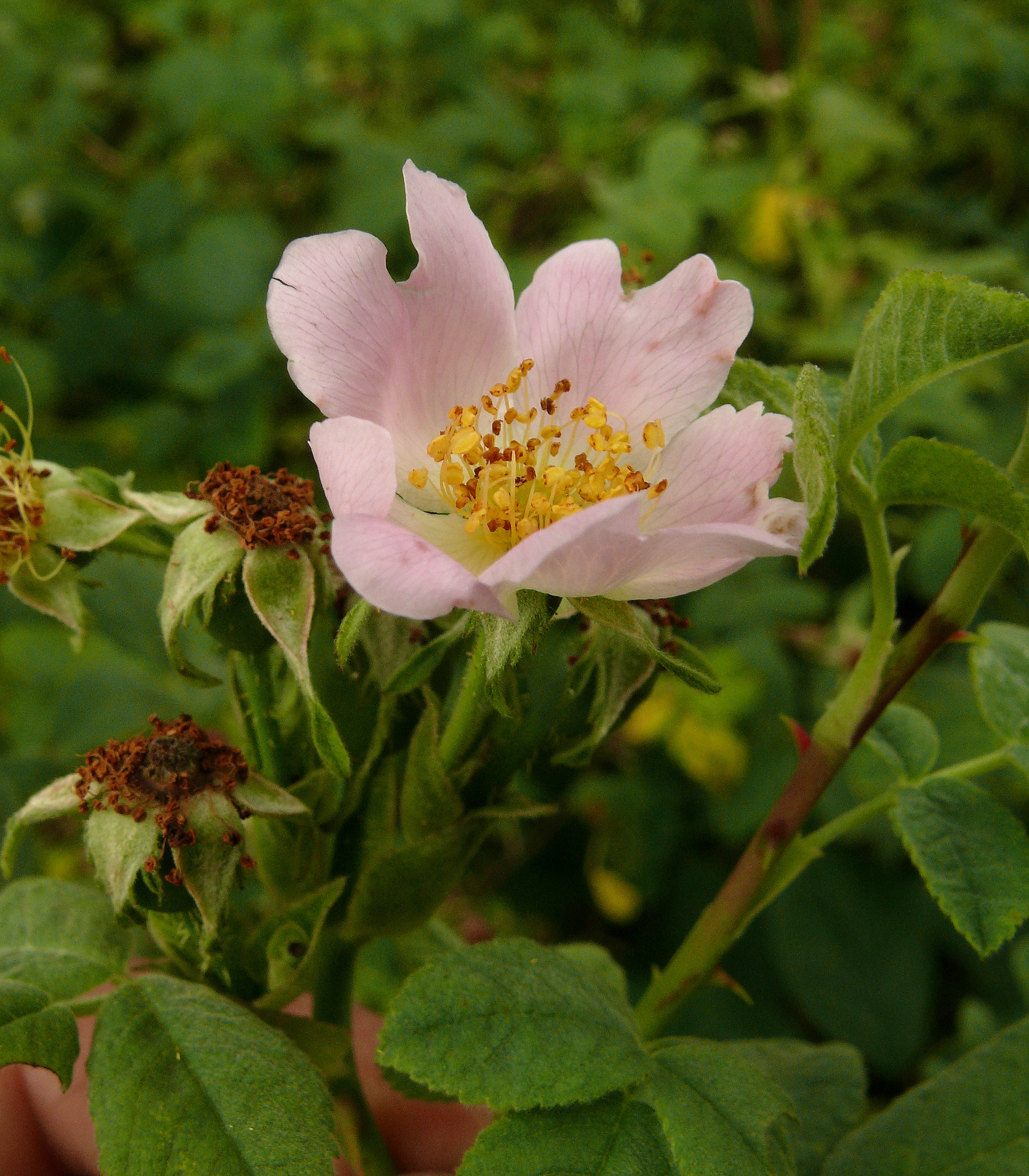 Rosa tomentosa, Schwäbisch-Fränkische Waldberge, Deutschland